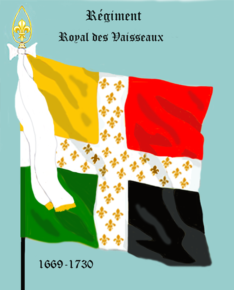 Ordonnanzfahne eines königlich französischen Infanterie-Regiments. - Entnommen und überarbeitet aus: „LES UNIFORMES ET LES DRAPEAUX DE L'ARMÉE DU ROI“ Marseille 1899. (Drapeau d'Ordonnance d' un régiment française d'infanterie royale.)